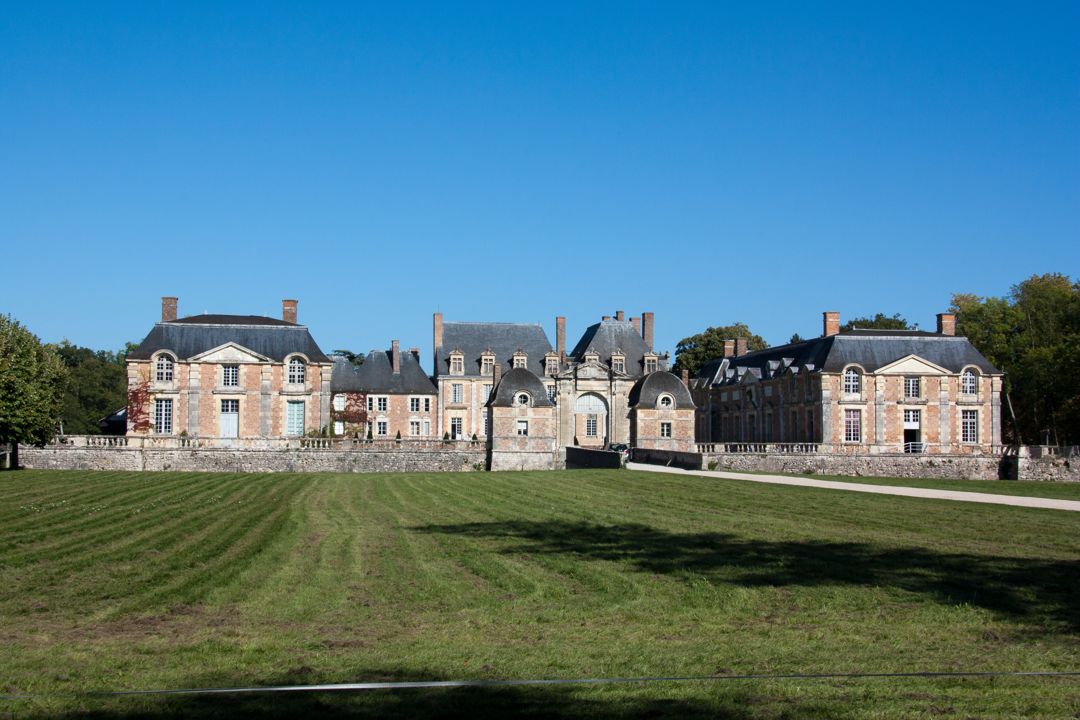 Château de la Ferté - La Ferté-Saint-Aubin, Loiret, France.